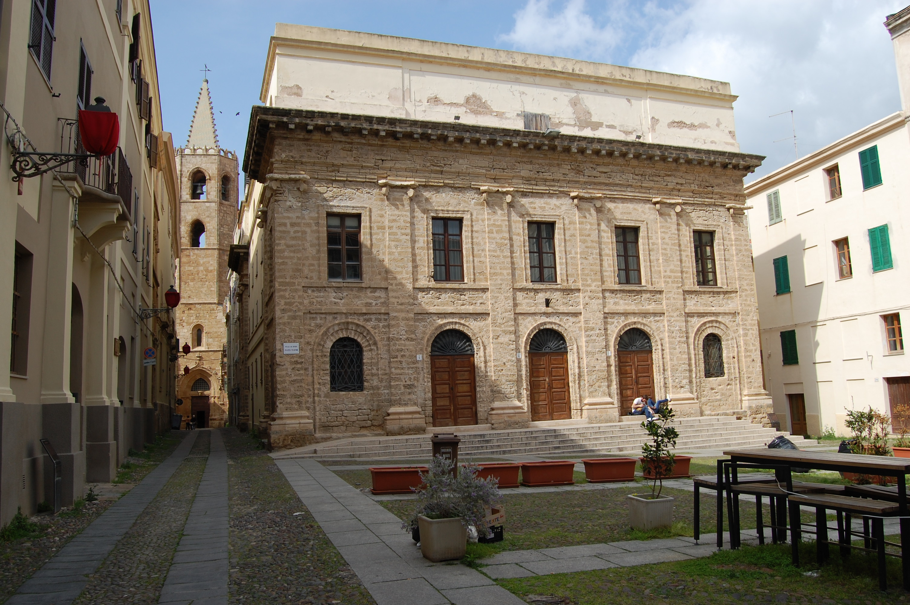 Teatre Cívic (L'Alguer)